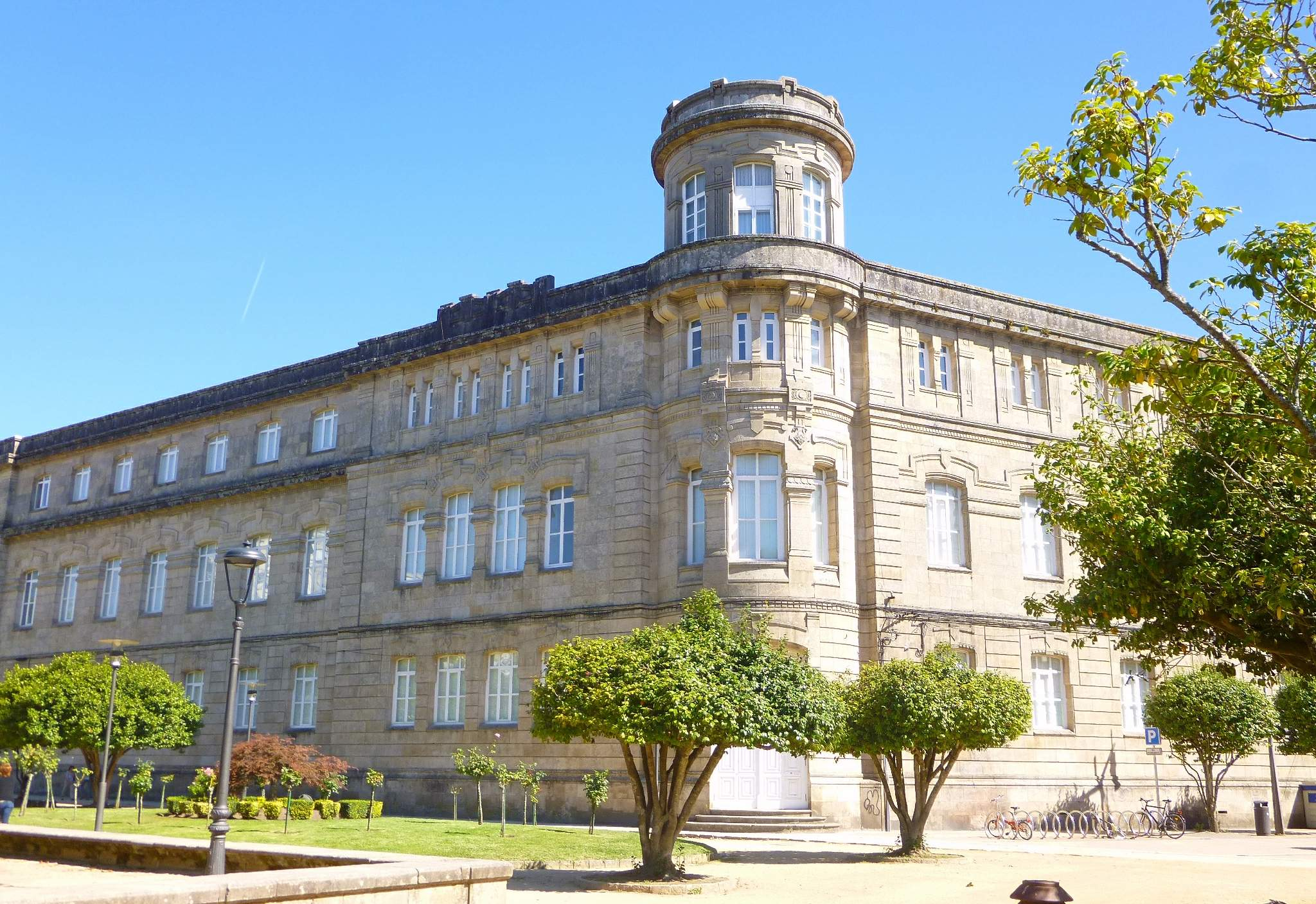 Pontevedra - Instituto Valle-Inclán